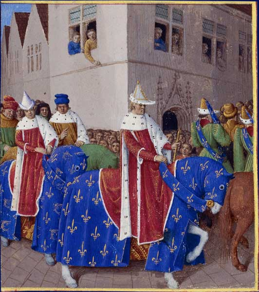 Charles V partant accueillir l'empereur Charles IV Grandes Chroniques de France, enluminées par Jean Fouquet, Tours, vers 1455-1460 Paris, BnF, département des Manuscrits, Français 6465, fol. 443v. (Livre de Charles V) Charles V le Sage, accompagné du Dauphin, de ses frères et de nombreux seigneurs et chevaliers, s'achemine vers la porte Saint-Denis pour aller accueillir l'empereur Charles IV et son fils Wenceslas, en 1378.